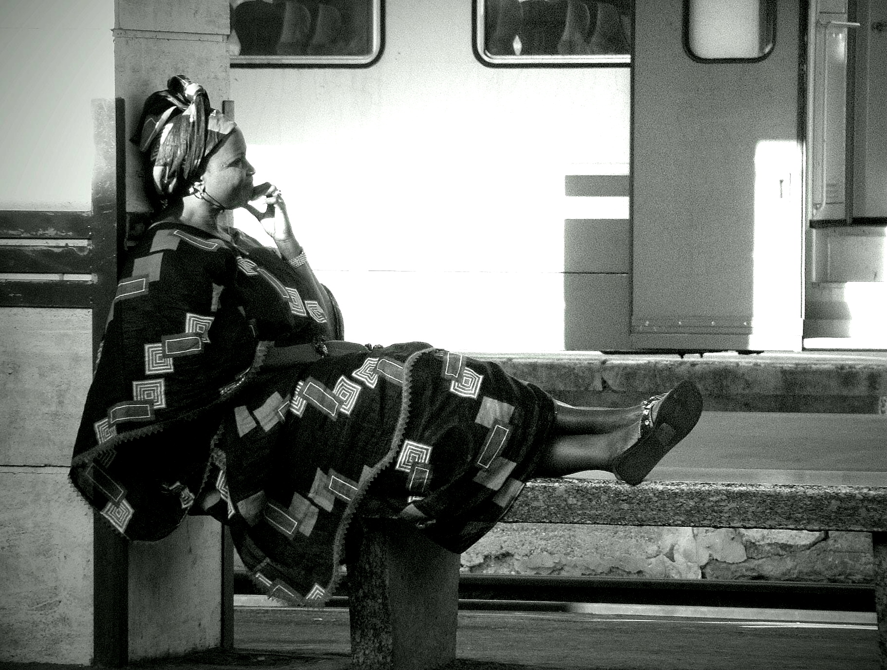 Novara, Piemonte, Italia - stazione ferroviaria